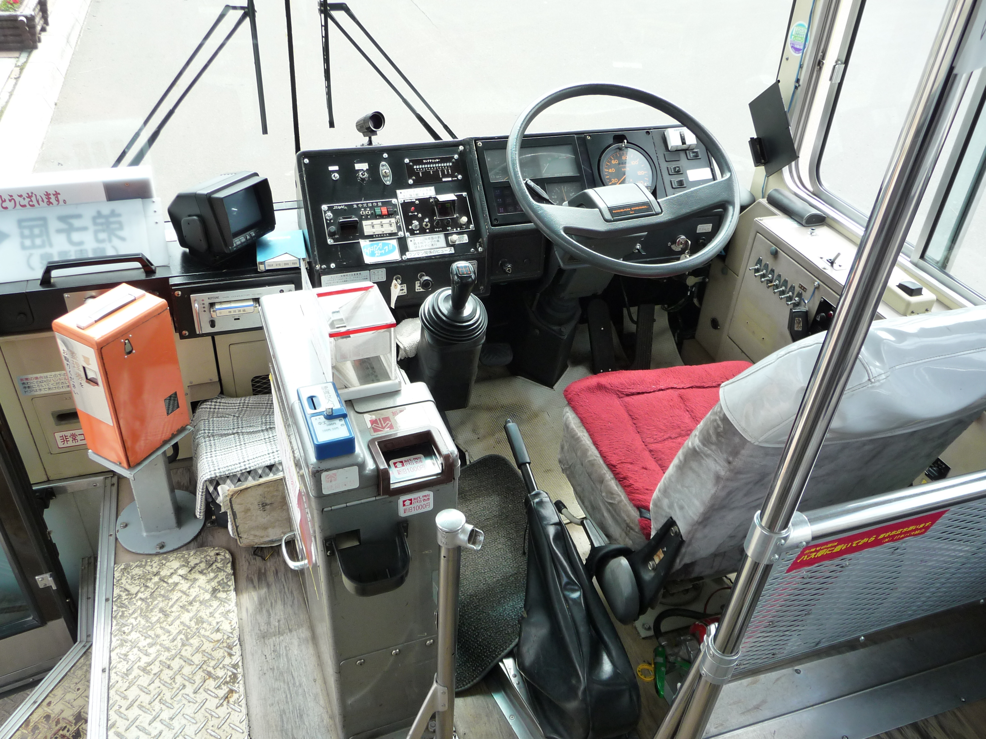 阿寒バス 釧路200か109の運転席 日産ディーゼルUA U-UA440LAN 2008年8月10日に、北海道弟子屈町摩周駅前で撮影